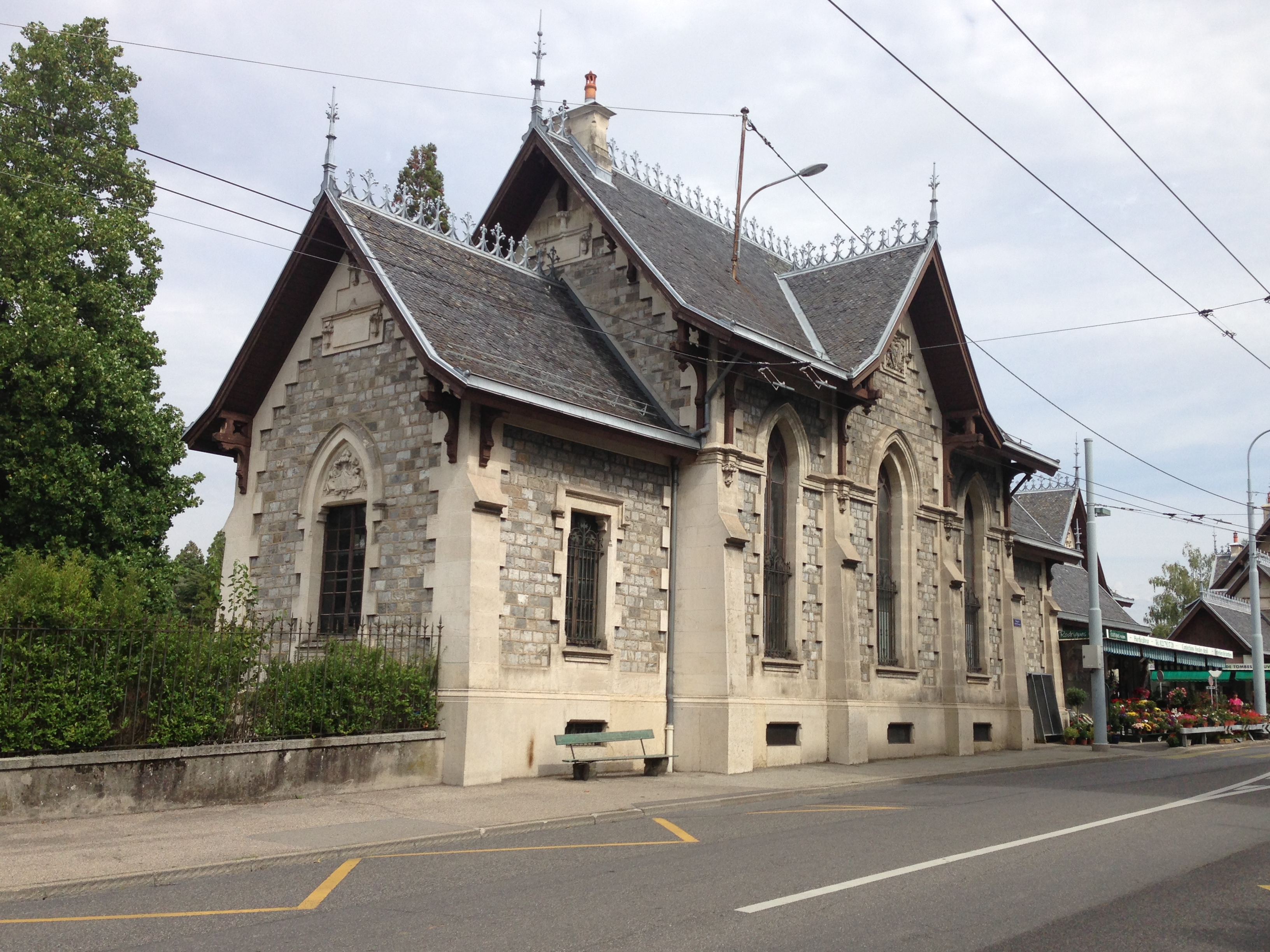 Corps de bâtiment néo-gothique du cimetière Saint-Georges de Genève, réalisé par John Camoletti (1848-1894)